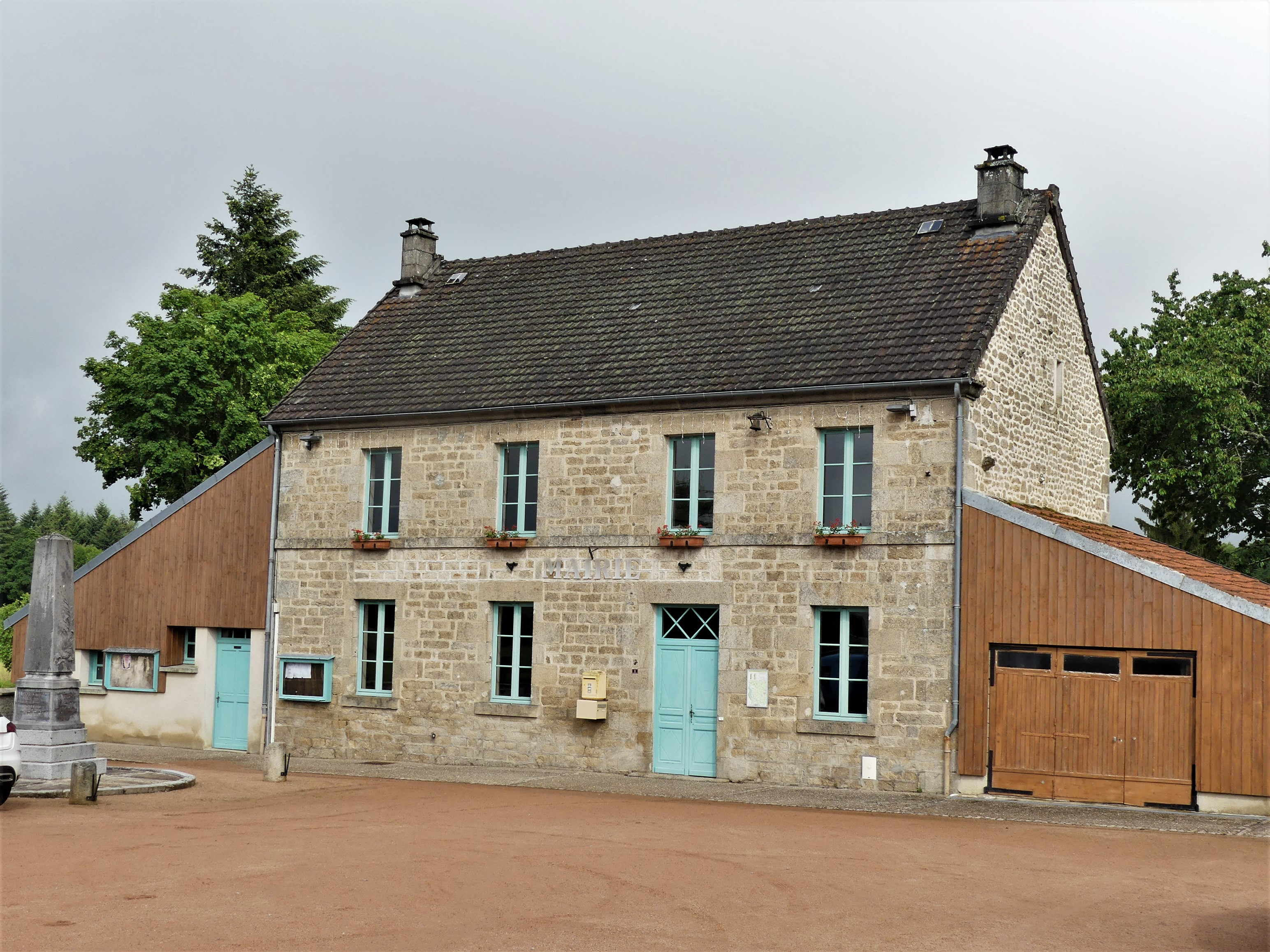 La mairie de La Pouge, Creuse, France.